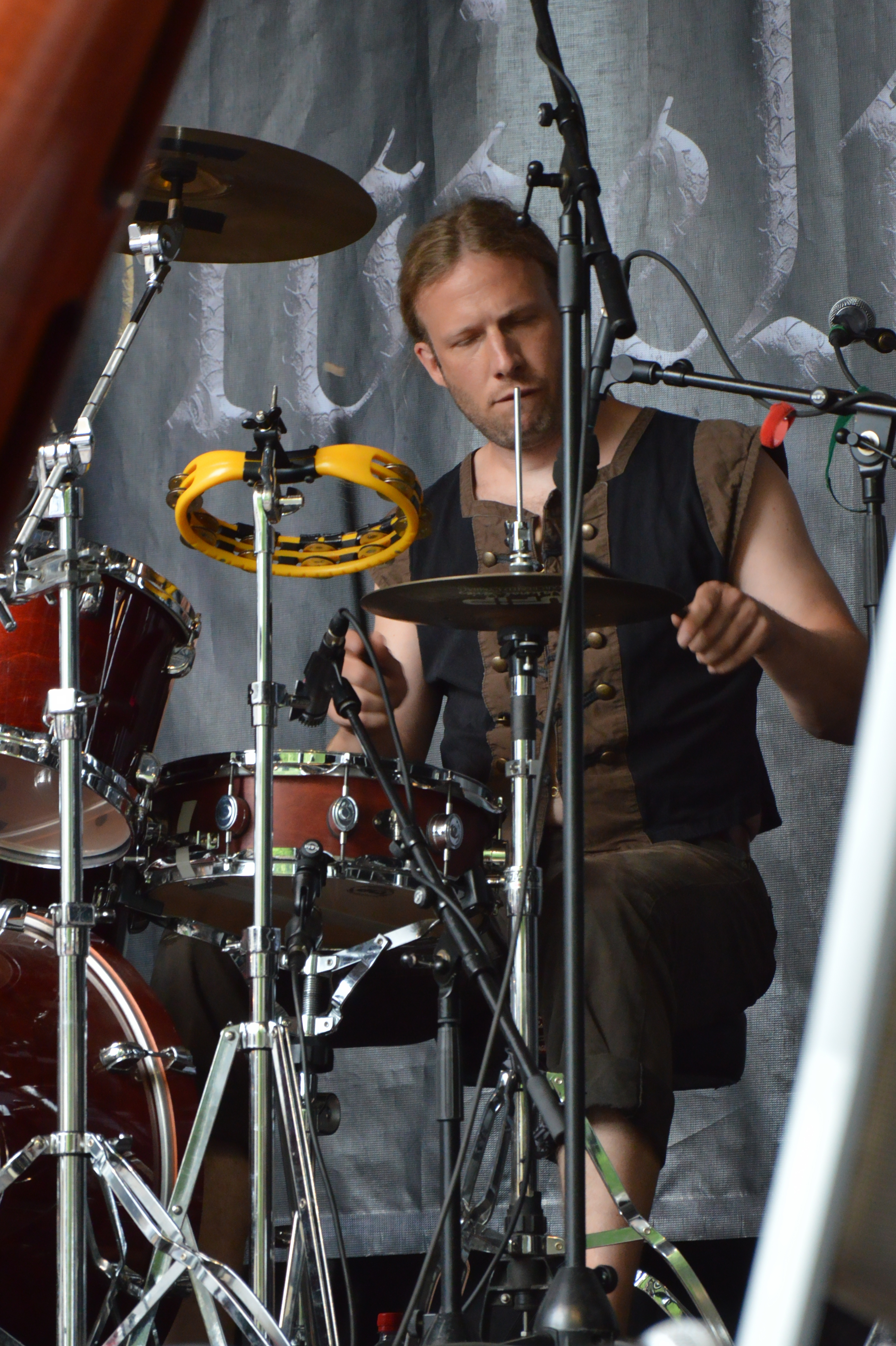 Zwielicht beim Burgfolk Festival 2013 auf Schloß Broich